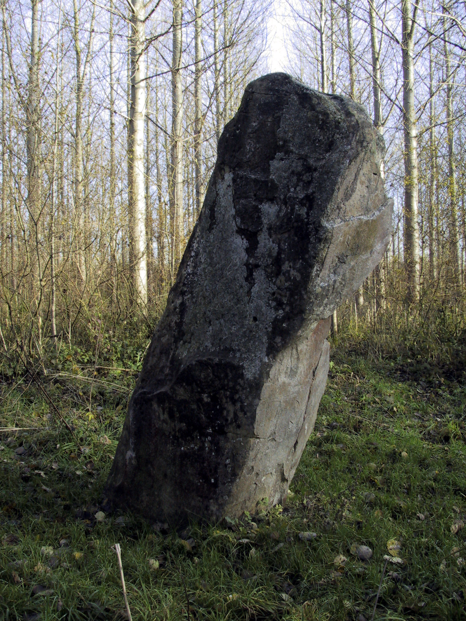 Le menhir est tout à fait surprenant grâce au Diable qui se pose dessus durant la nuit.